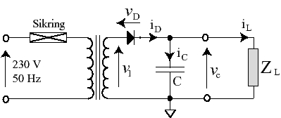 Alimentation électrique sans régulateur